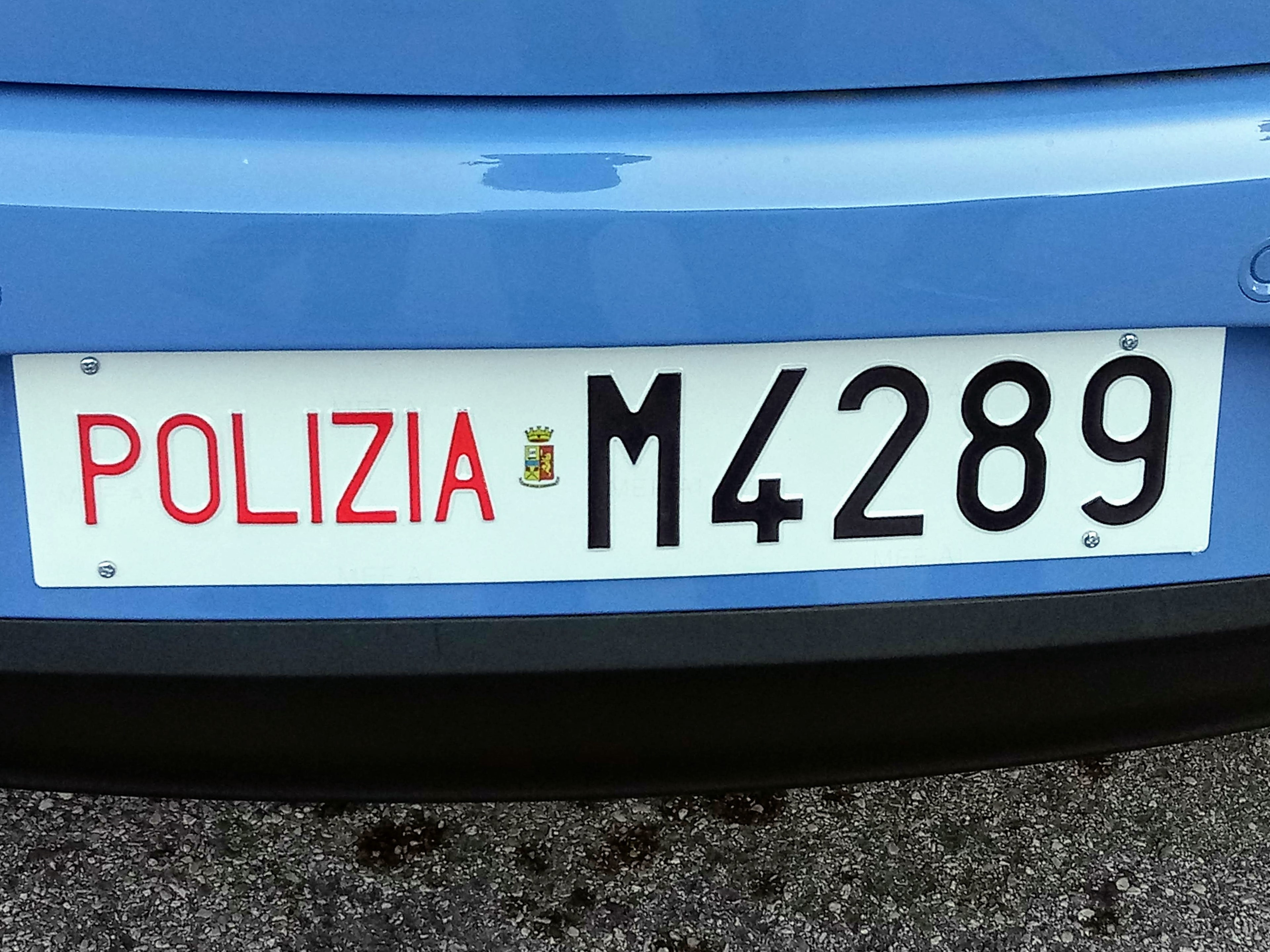 La foto rappresenta una targa posteriore di una Alfa romeo Giulietta della Polizia di Stato italiana con il nuovo logo e su un'unica riga. Rotazione foto rispetto all'immagine caricata ieri